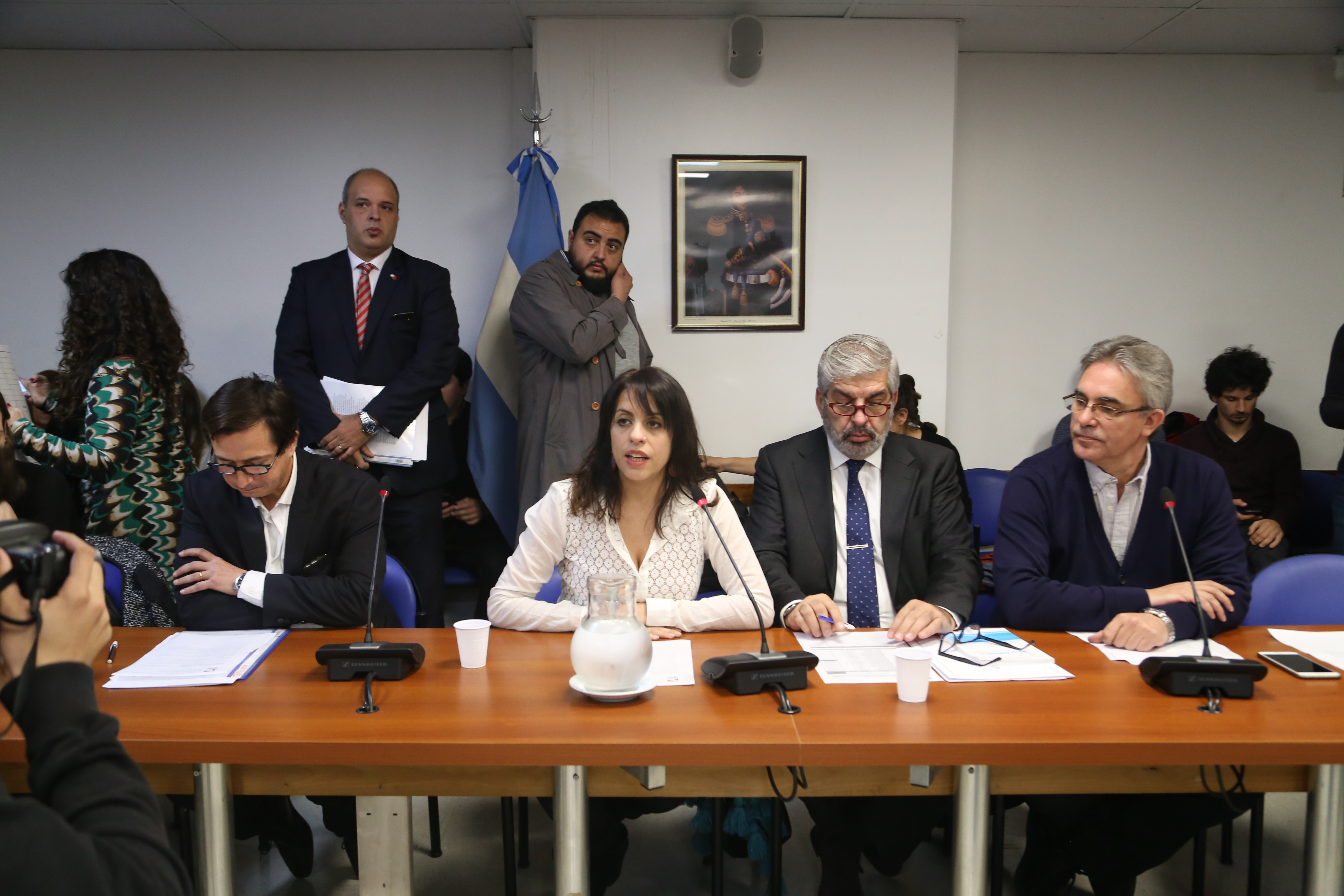 La Comisión de Derechos Humanos y Garantías de la Cámara de Diputados de la Nación se reunió para analizar el caso de Santiago Maldonado, desaparecido en la provincia de Chubut.